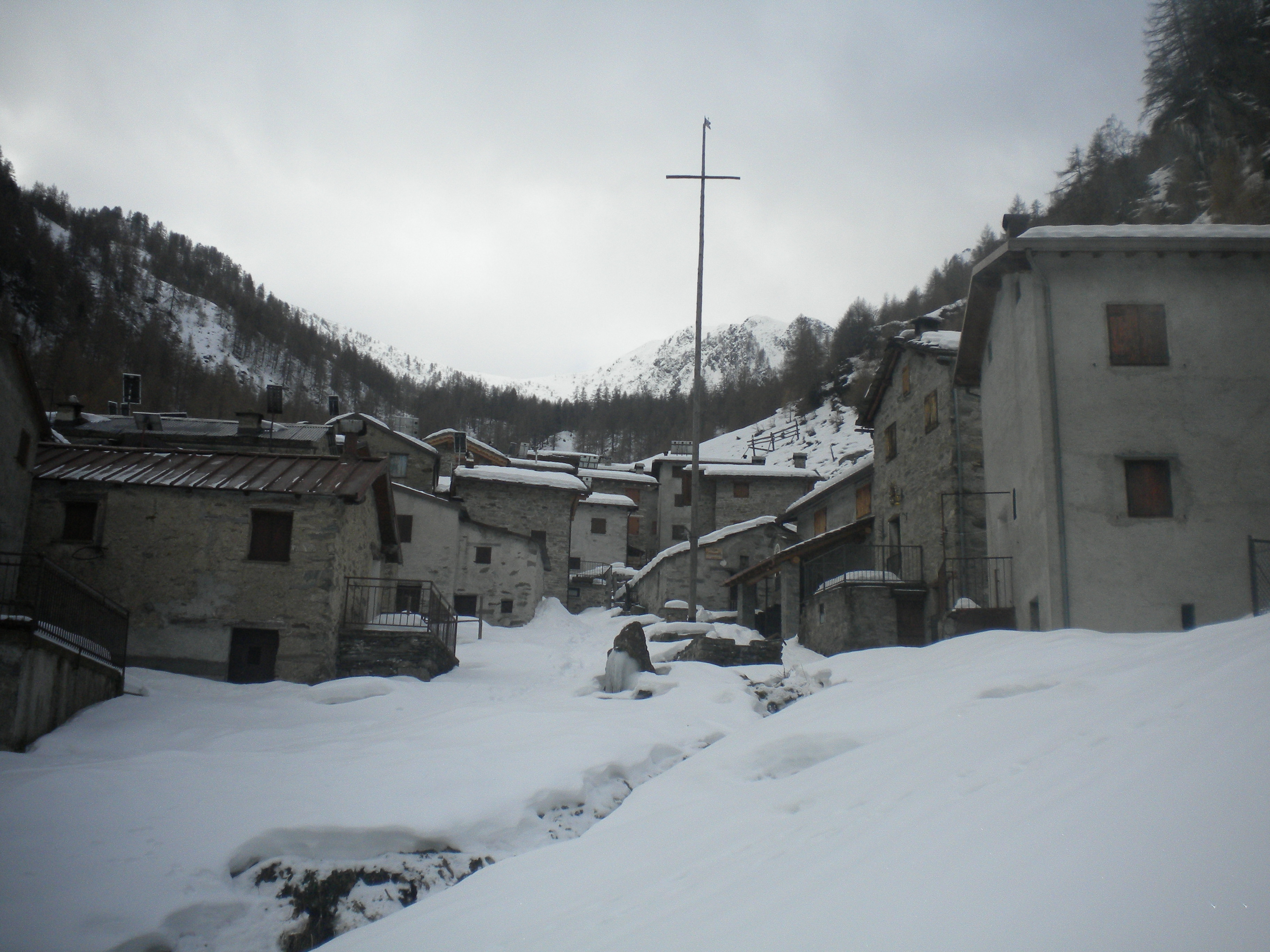 Veduta piazza centrale